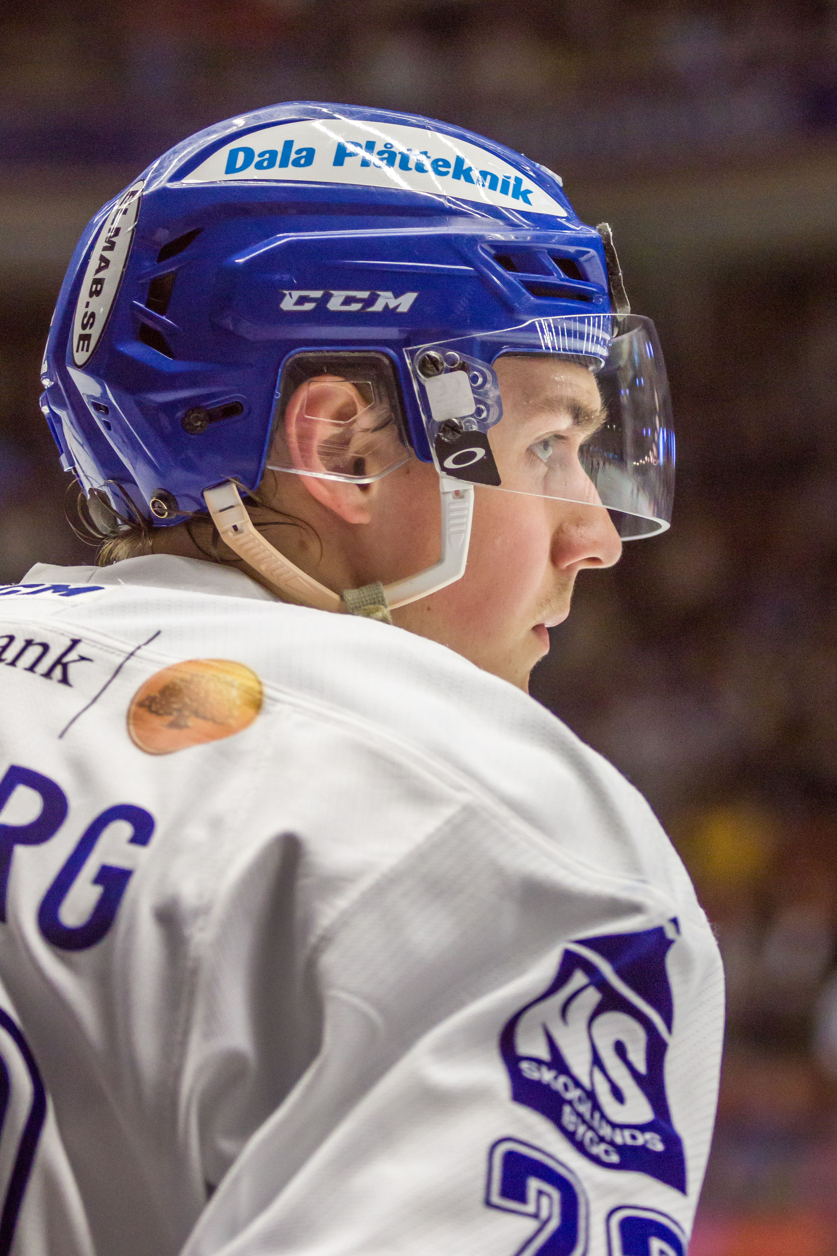 Martin Grönberg i Leksands IF.